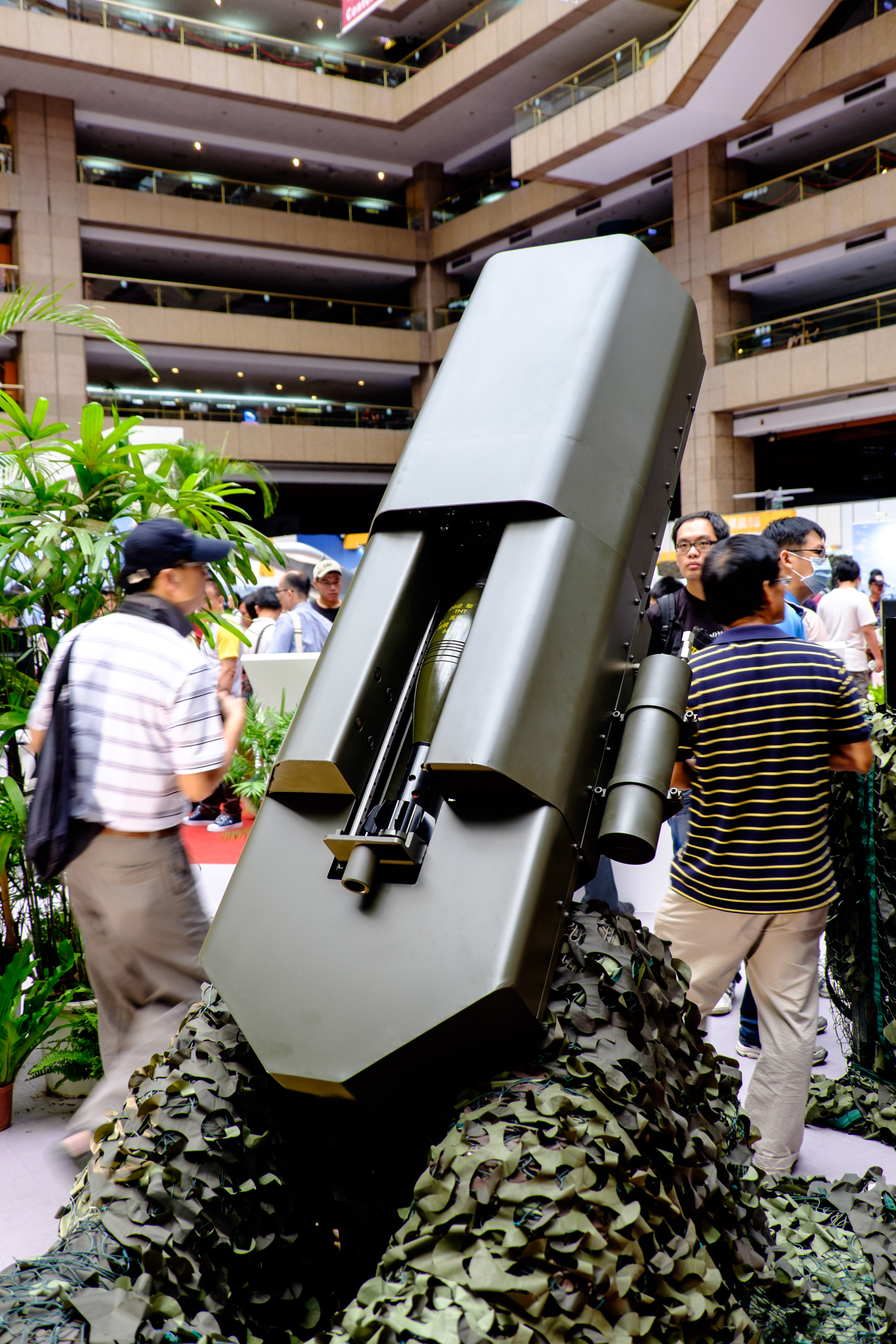 2015台北國際航太暨國防工業展覽會第三日，國防館展示國防部軍備局生產製造中心研發120mm車裝迫擊砲與半自動裝彈系統，射速每分4～8發，可用於雲豹甲車。